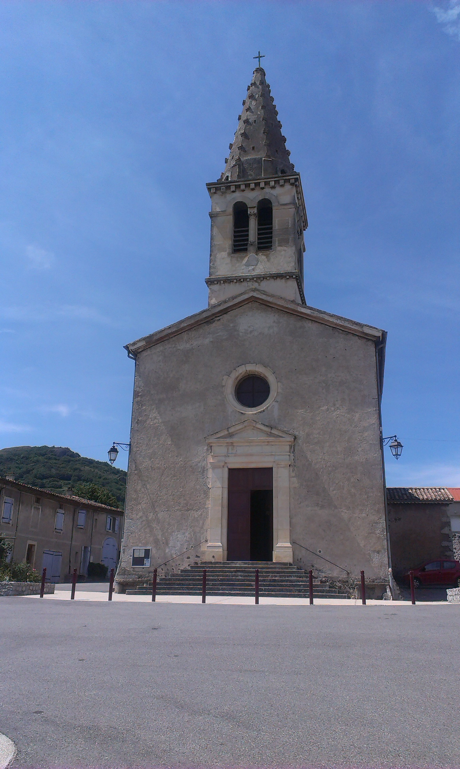 Saint-Lager-Bressac - église